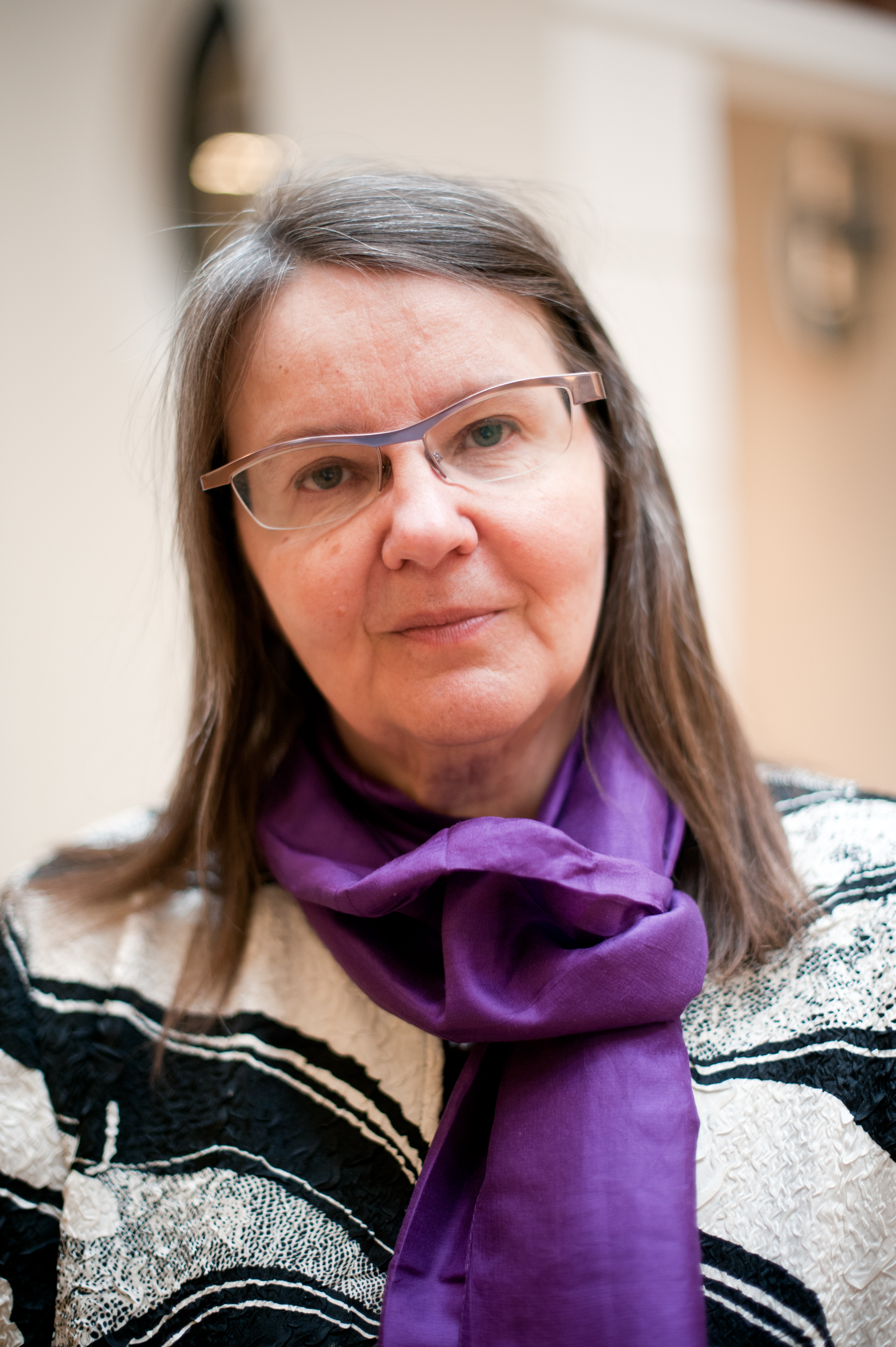 Eva Ström